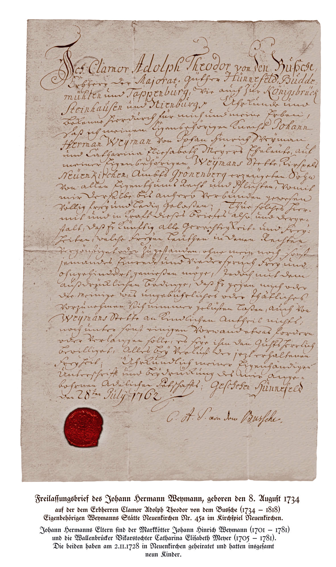 Freilassungsbrief des Johann Hermann Weymann 1762 / historic letter to give someone free from serfdom (1762) Inhalt: J o h. C l a m o r A d o l p h T h e o d o r v o n d e n B u ß c h e, Erbherr der M a j o r a t-Güther H ü n n e f e l d, B u d d e – m ü h l e n und T a p p e n b u r g, wie auch Zue K ö n i g s b r ü c k S t e i n h a u s e n und N i e n b u r g « Uhrkunde und Bekenne hierdurch für mich und meiner Erben, daß ich meinen Eigenbehörigen Knecht J o h a n n H e r m a n W e y m a n von Johan Hinrich Weyman und Catharina Eliesabeth Meyers Eheleute, auf meiner Eigenbehörigen W e y m a n s Stette, Kirspels N e u e n k i r c h e n, Ambts G r ö n e n b e r g erzeugeten Sohn von allen Eigenthums Recht und Pflichten, womit mir derselbe bis anhere verbunden gewesen völlig frey und ledig gelaßen; Thue solches Hier- mit und in Kraft dieses Briefes also und derge- stalt, daß Er künftig alle Gerechtigkeit- und Frey- heiten, welche Freyen Leuthen in denen Rechten vergönstiget oder Zu gestanden, ohne mein noch sonst jemandes Einrede und Wiederspruch Frey und ohngehindert genießen möge, Jedoch mit dem außdrücklichen Bedinge, daß Er gegen mich oder die meinige was ungebührliches oder Thätliches vorzunehmen sich nimmer gelüsten laßen, auch von W e y m a n s Stette an Kindlichen Anthrib nichts, noch unter sonst einigen Vorwand etwas fordern oder verlangen solle, es seye ihm dan Guthsherrlich bewilliget, Alles bey Verlust der jetzt erhaltenen Freyheit; Urkundlich meiner Eigenhändigen Unterschrifft und Beydrückung des mir ange- bohrenen Adelichen Petschaffts; Geschehen H ü n n e f e l d den 28ten July 1762 C. A. T. von den Busche.